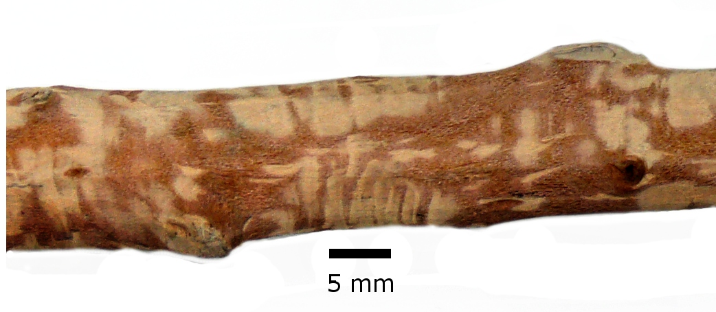 traces de dents sur branchette rongée par un castor européen